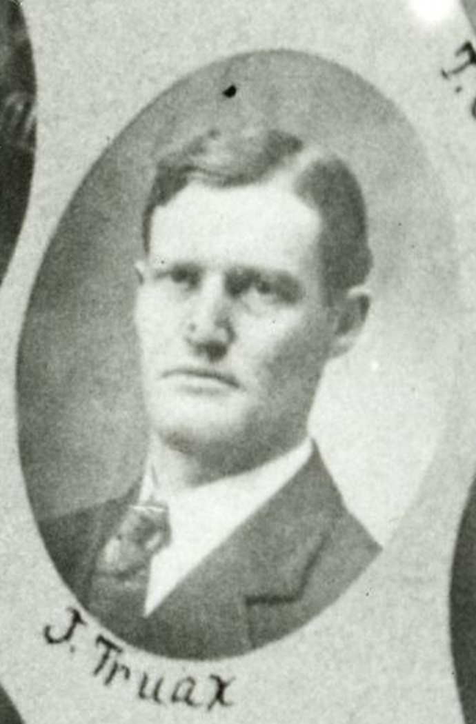 SEn Truax